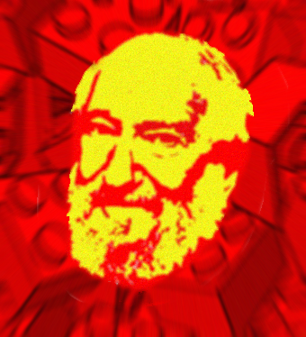 Bild aus englischer Wikipedia, Artikel "Seymour Papert" Nachfolgende Angaben aus englischer Wikimedia Commons: coaxialjack, 2005. license: public domain